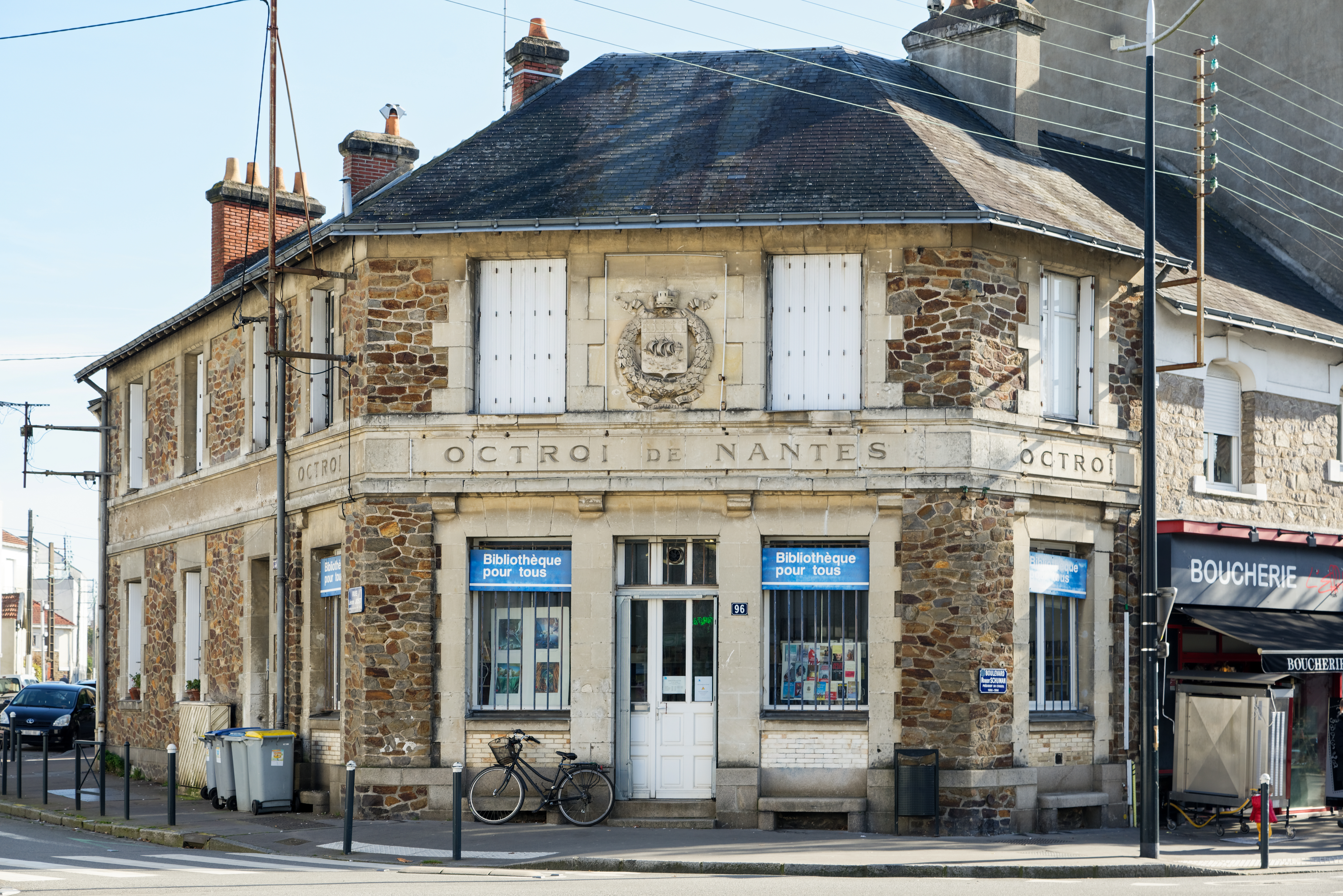 Ancien octroi de Nantes devenu une bibliothèque, 96 boulevard Robert-Schuman (Nantes, Loire-Atlantique, Pays de la Loire, France).